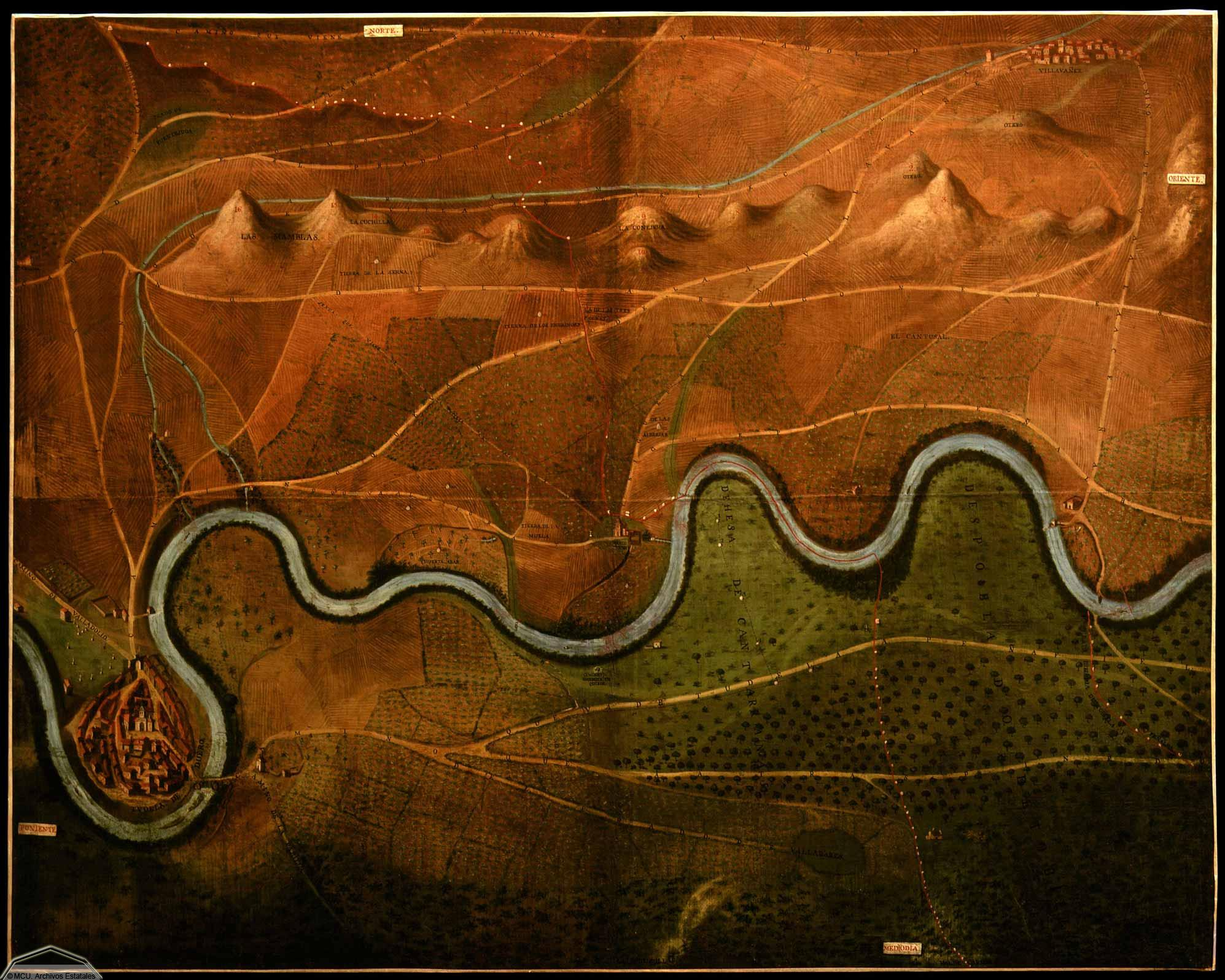 Carta topográfica de los términos colindantes a Tudela de Duero y Villabáñez (Valladolid).